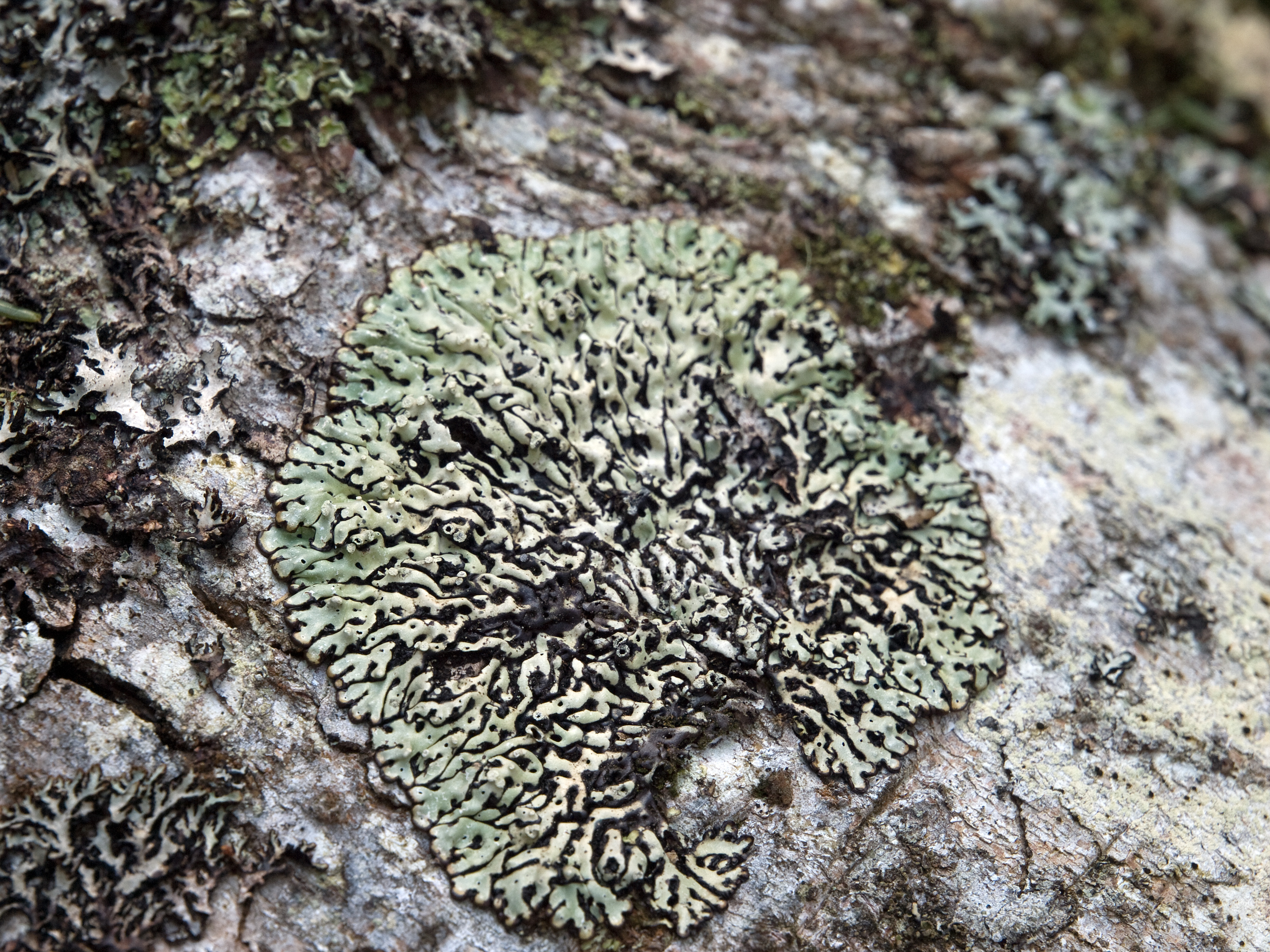 Blattflechte Menegazzia terebrata Picture taken in Berchtesgaden/Bavaria